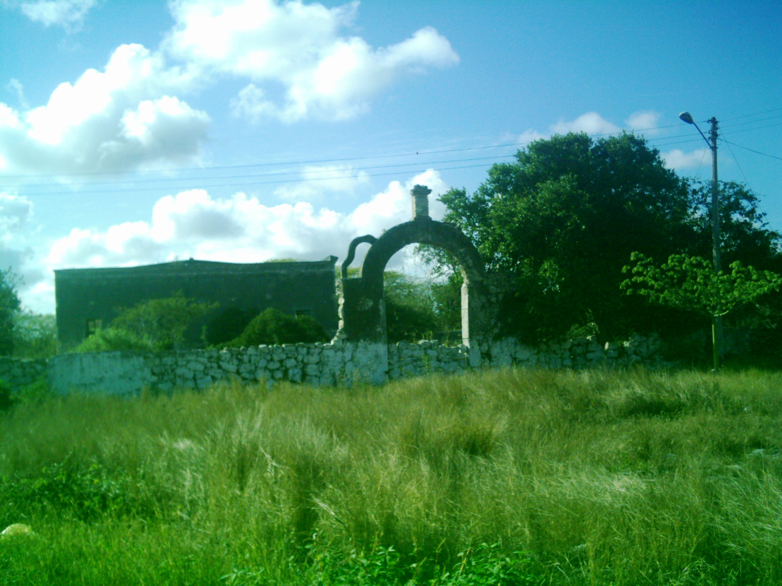 Hacienda de Dzidzilché, Yucatán.